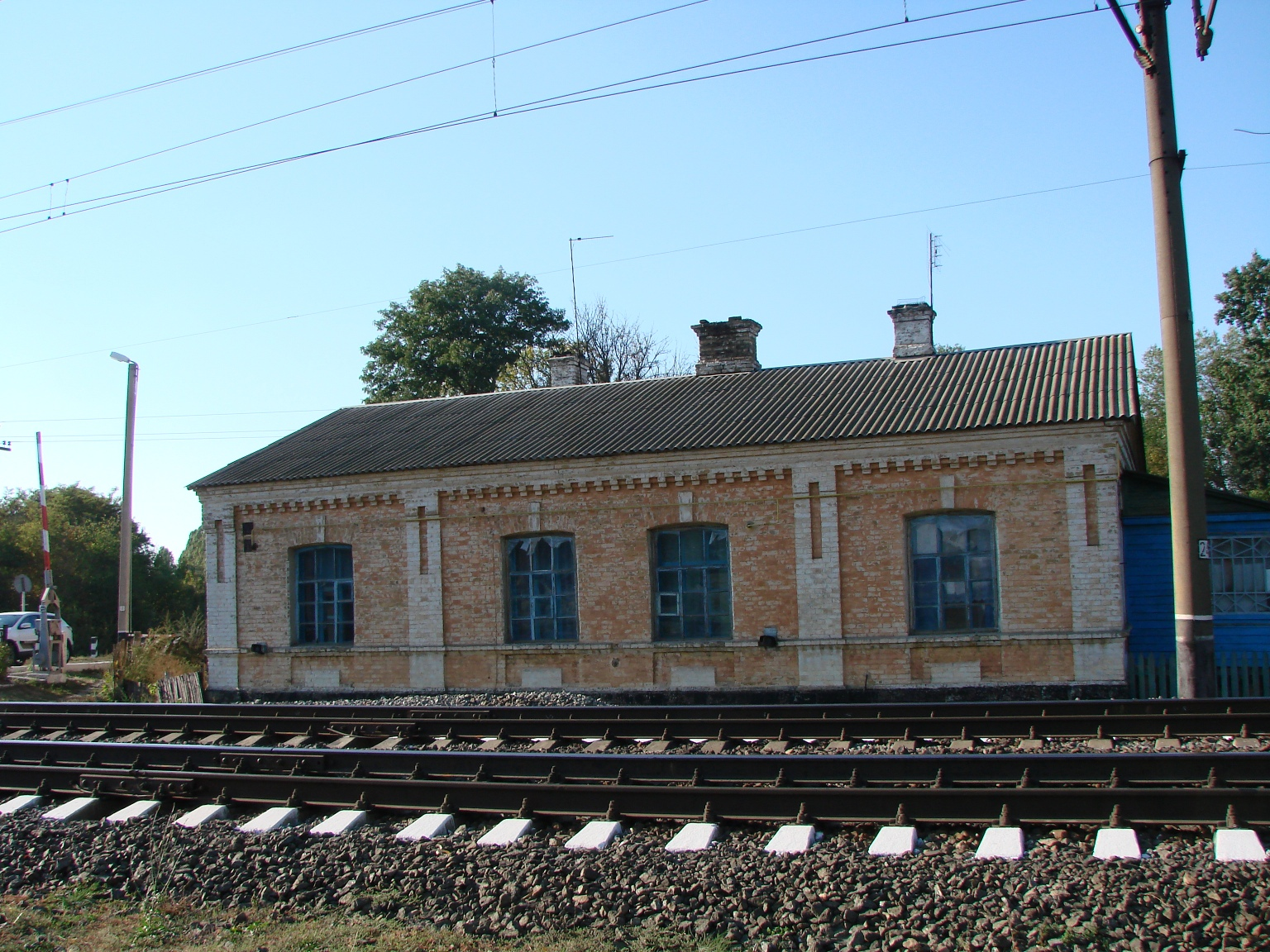 Колійна казарма біля переїзду. Село Марківці, Бобровицький район, Чернігівська область.